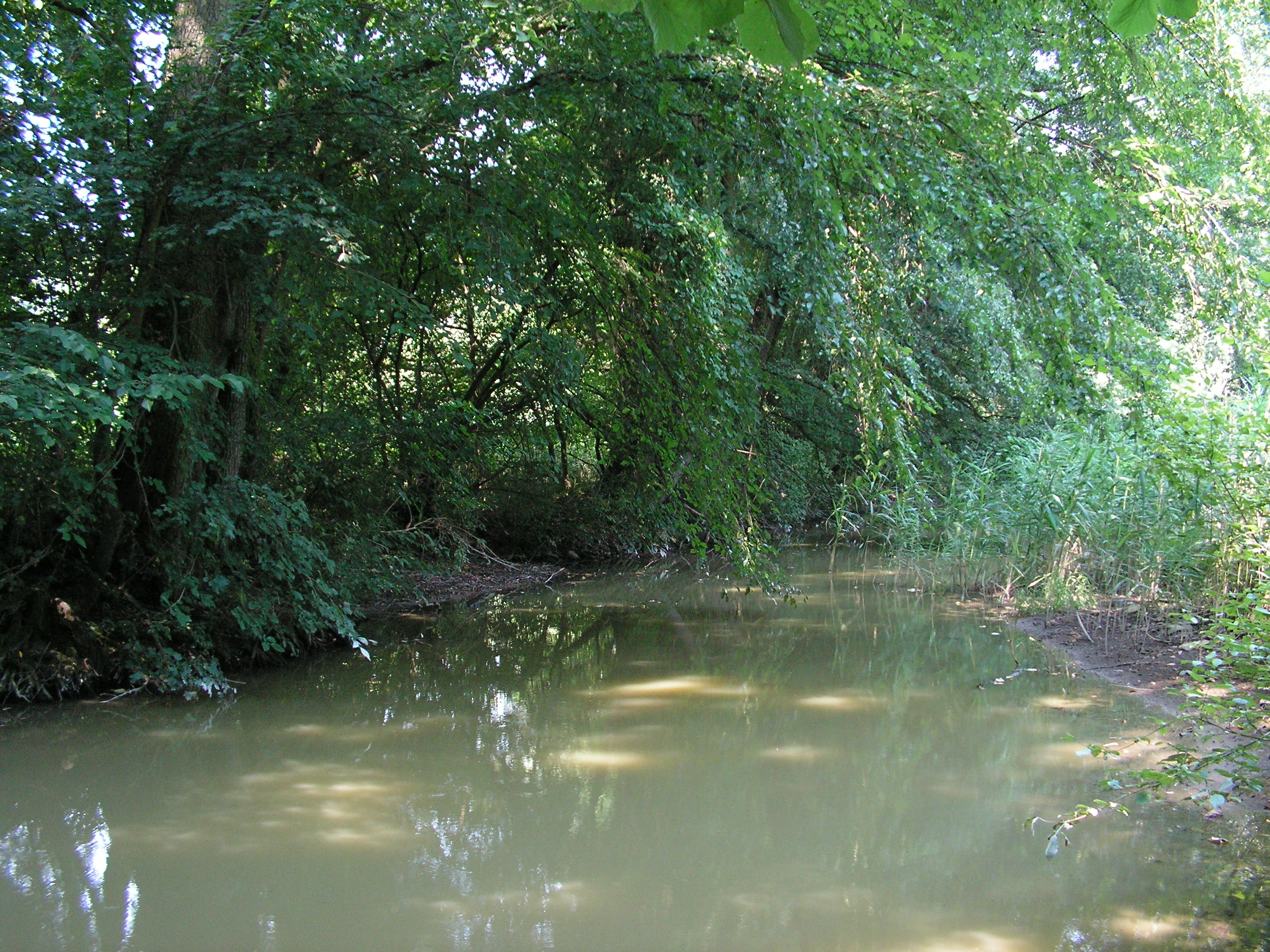 Ještětický potok pod hrází Podchlumského rybníka v okrese Rychnov nad Kněžnou